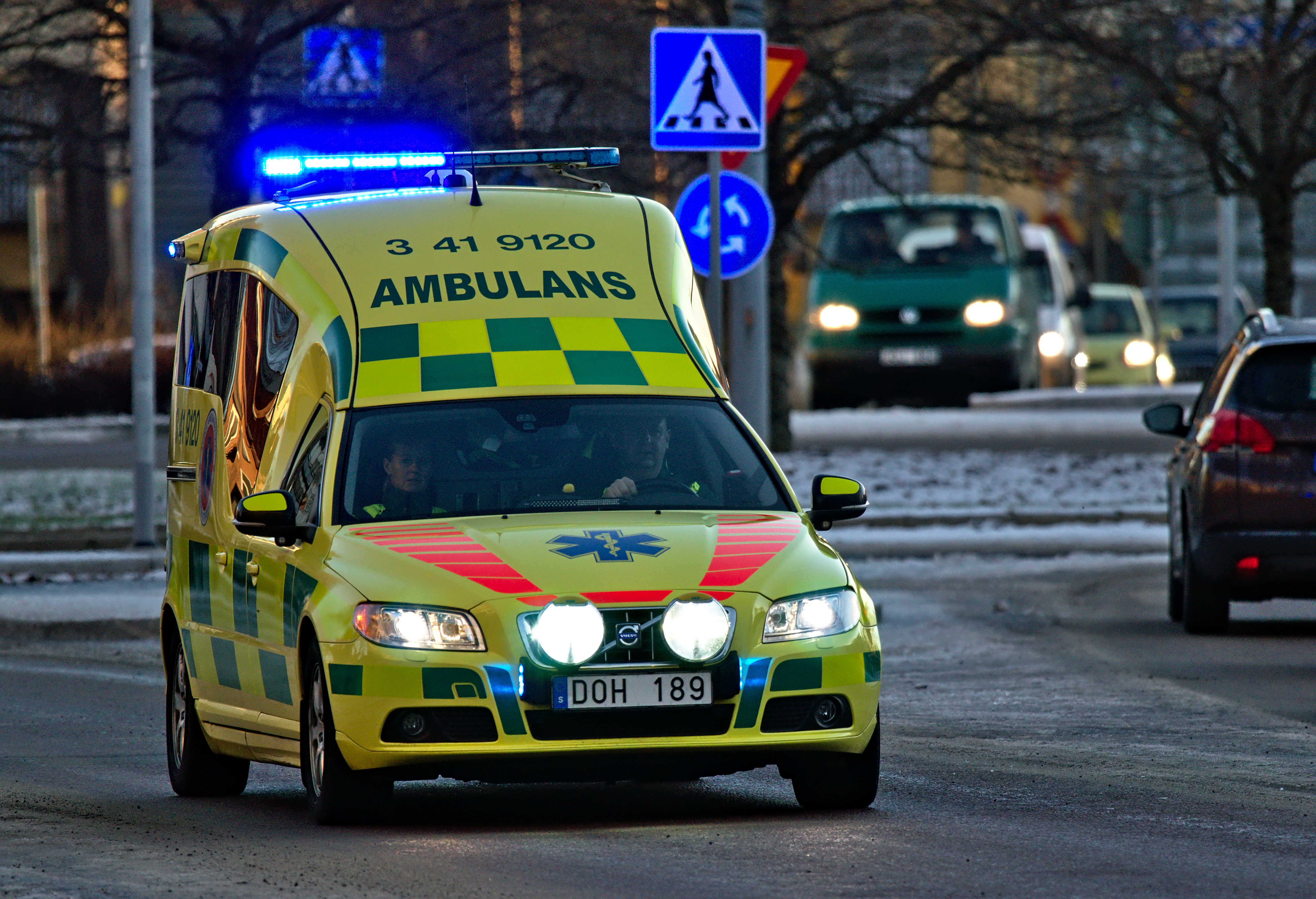 Ambuland under utryckning i Eskilstuna. Snö i bakgrunden.